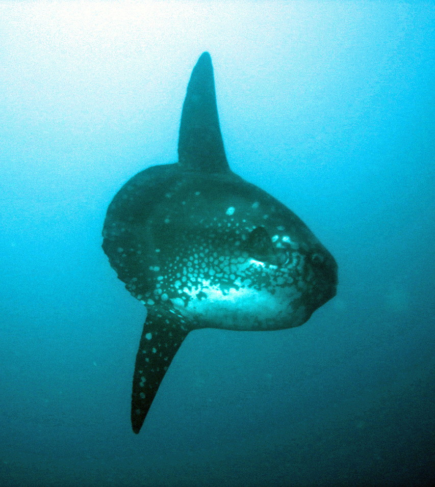 Mola Mola géant ou poisson lune, looks like Mola tecta